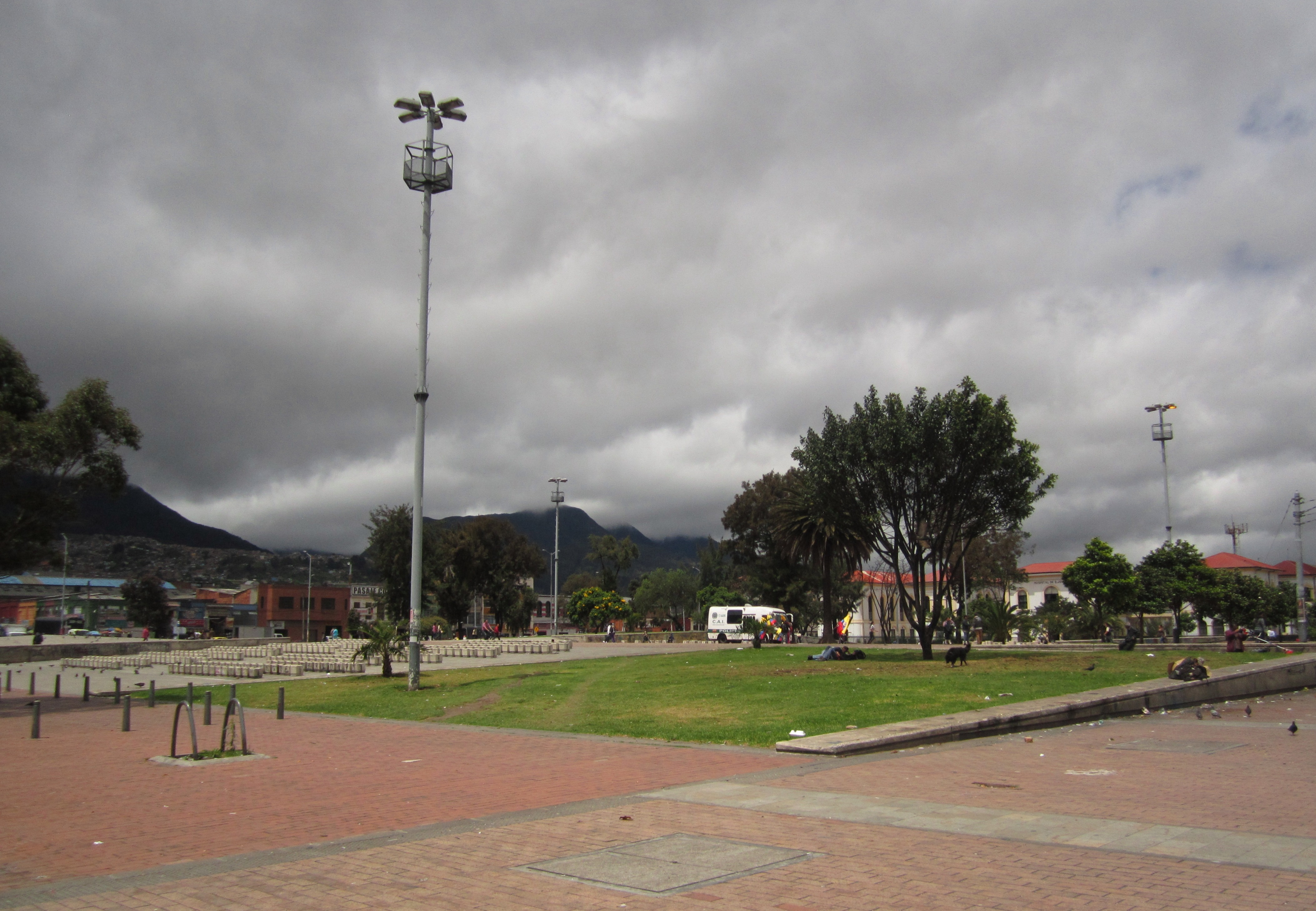 Bogotá plaza España.